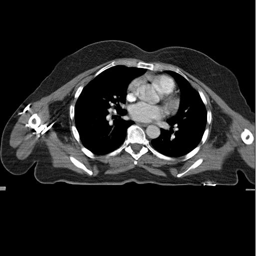 CT original